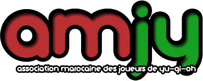 Logo de l'association Marocaine des joueurs de Yu-Gi-Oh